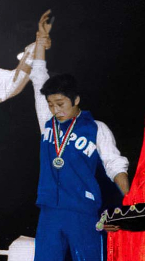 Boxing 48 kg podium, 1974 Asian Games in Tehran. Noboru Uchiyama